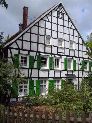 Denkmalgeschütztes Haus Lohmann in Ennepetal This is a photograph of an architectural monument.